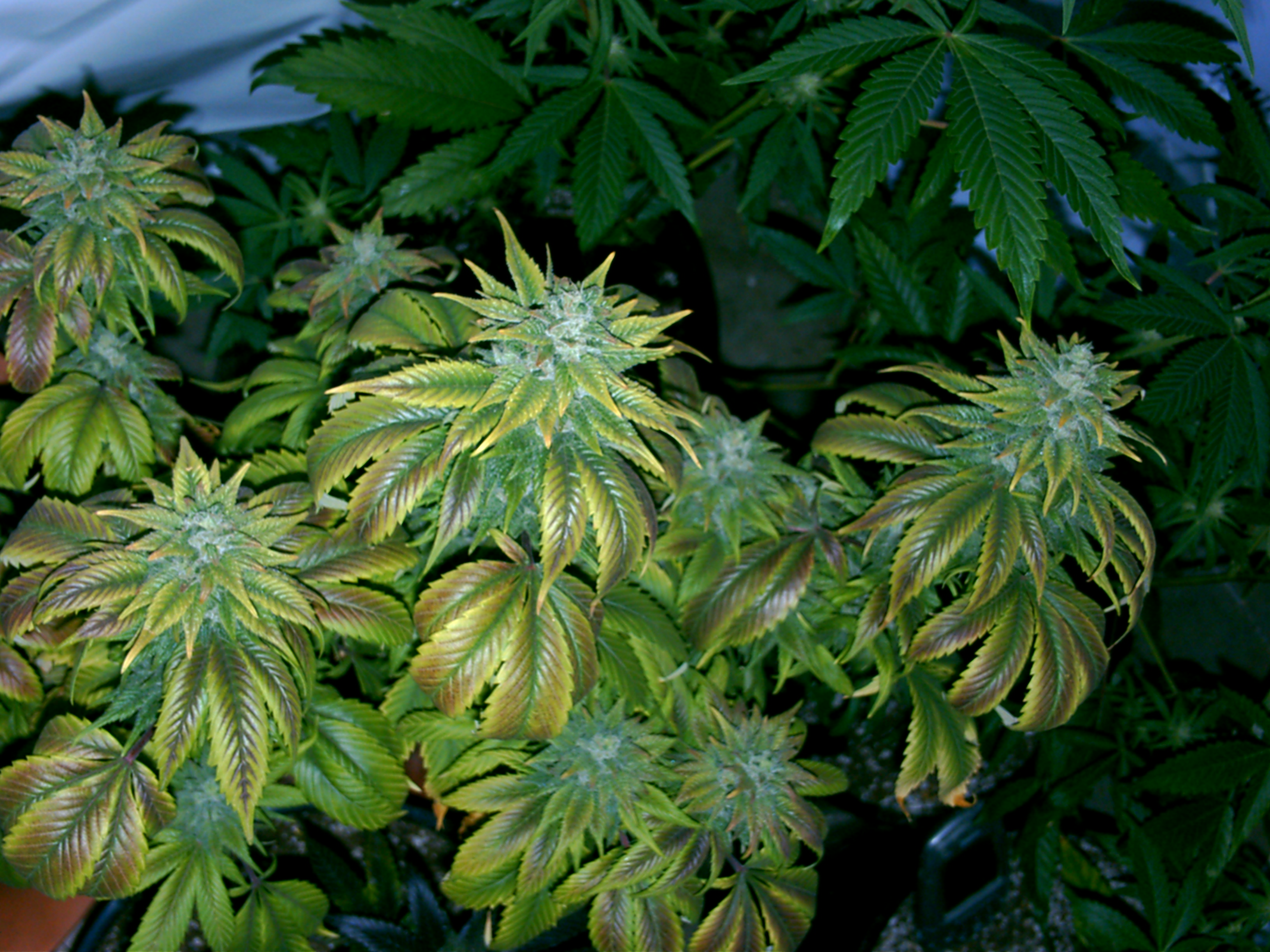 Medical marijuana Acapulco gold